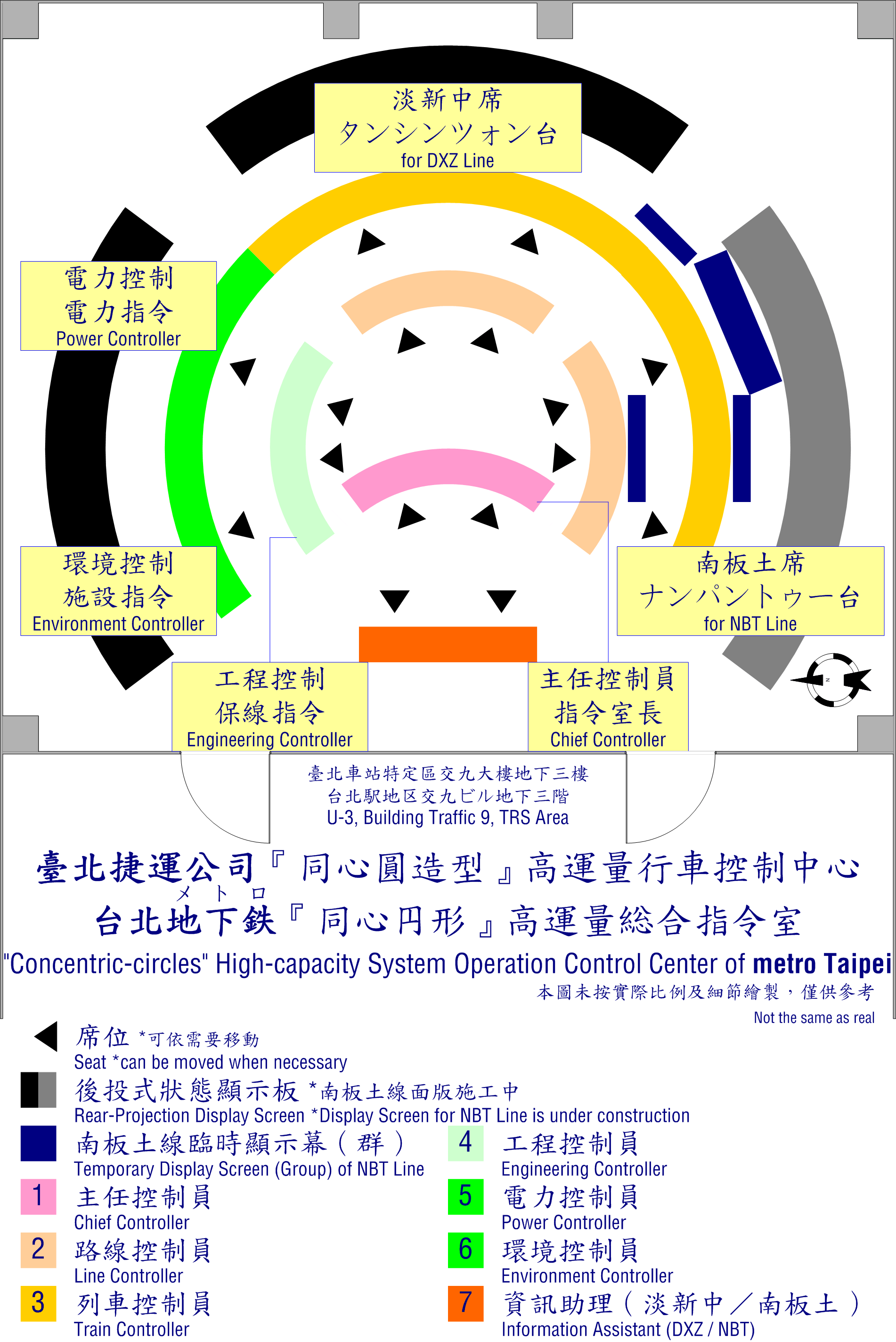 臺北捷運交九行控中心席位示意圖。Bân-lâm-gú: Tâi-pak Tsiat-ūn Kau-kiú Hîng-khòng Tiong-sim si̍k-uī sī-ì-tôo.